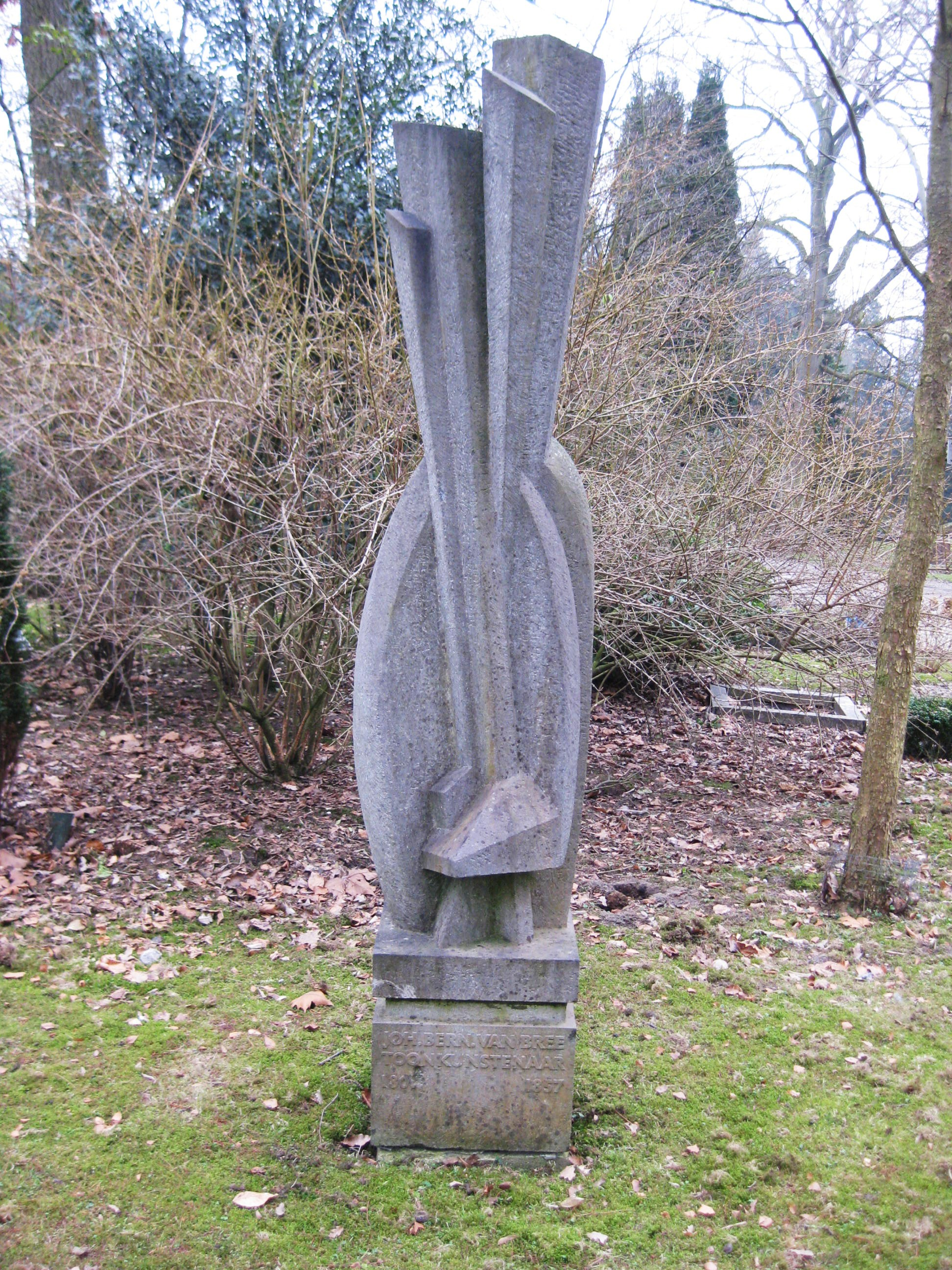 Graf van Johannes Bernardus van Bree op begraafplaats De Nieuwe Ooster in Amsterdam. Beeldhouwer Atze Haytsma.